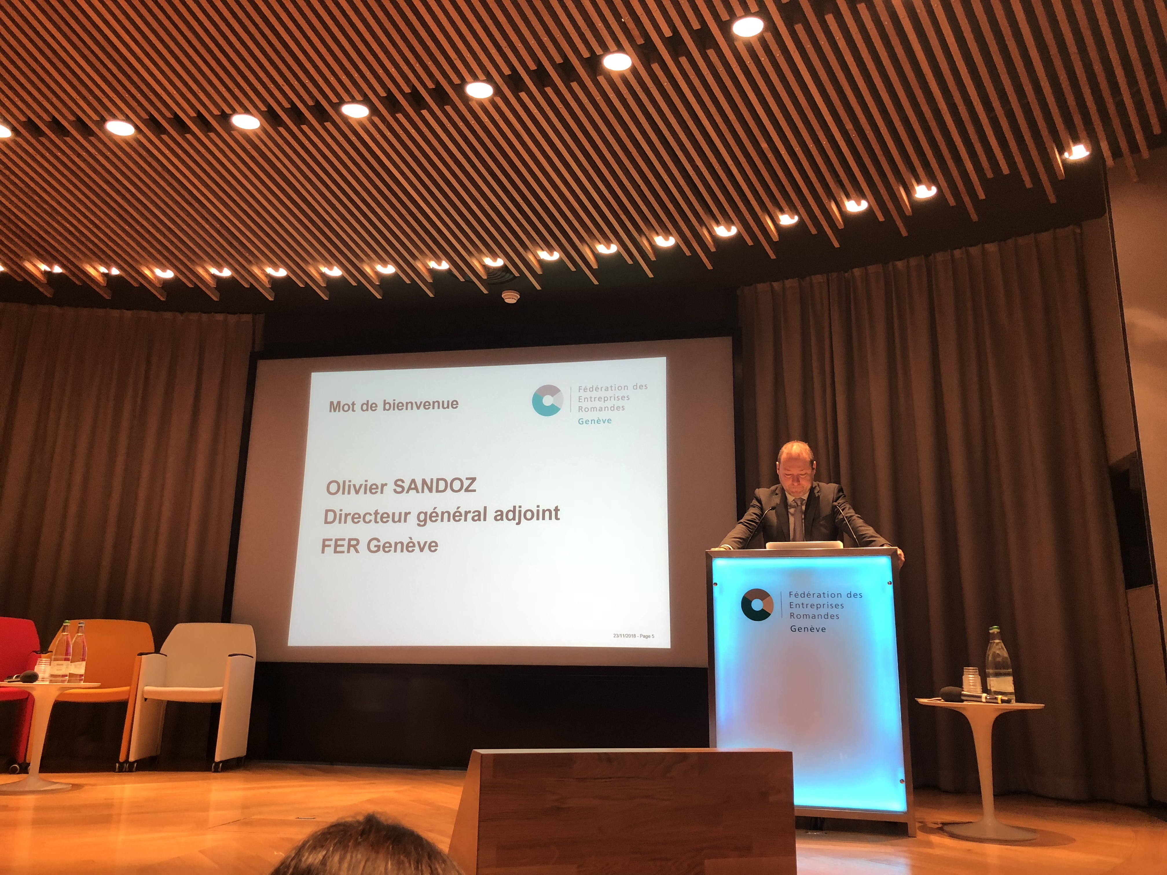 Olivier Sandoz au forum d’économie numérique de la FER à Genève